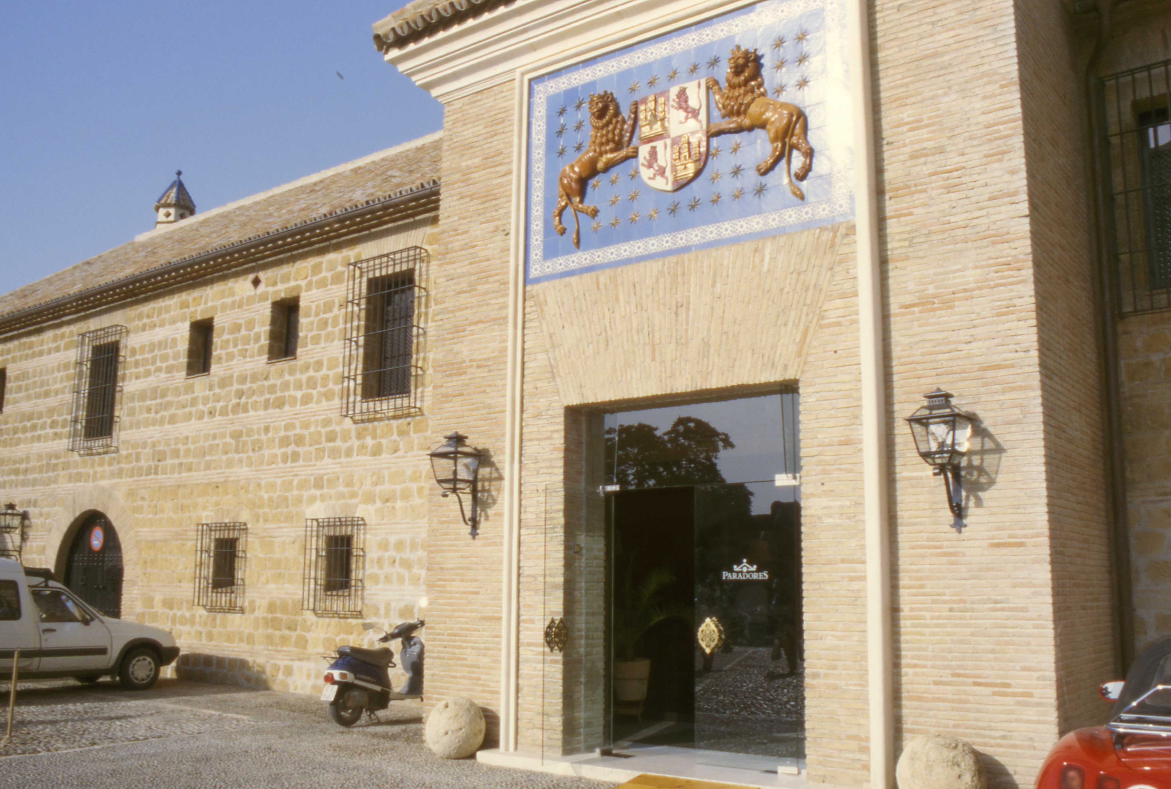 ParadorDeCarmonaAnsicht